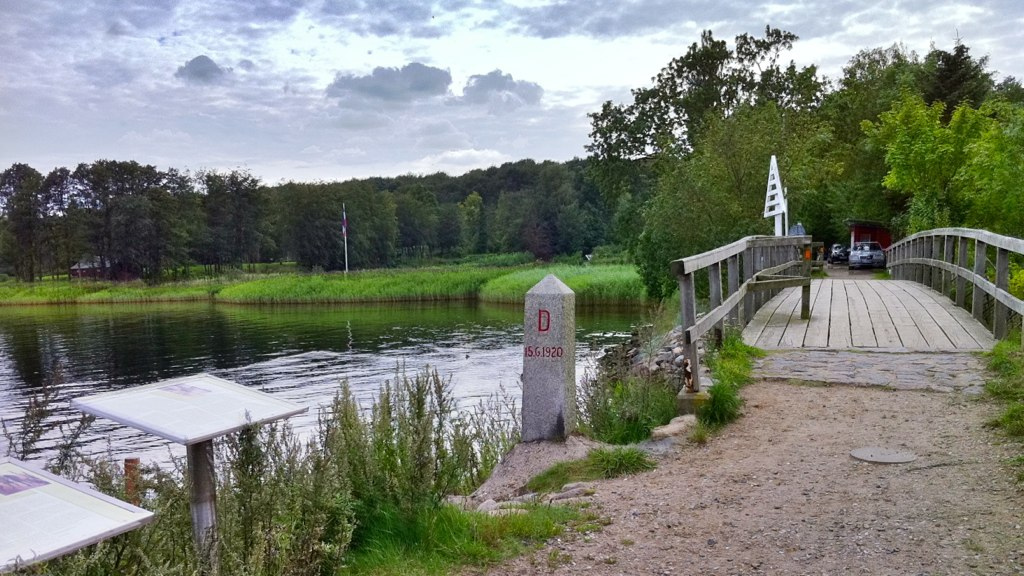 Grenzstein Kruså - Harrislee bei Flensburg